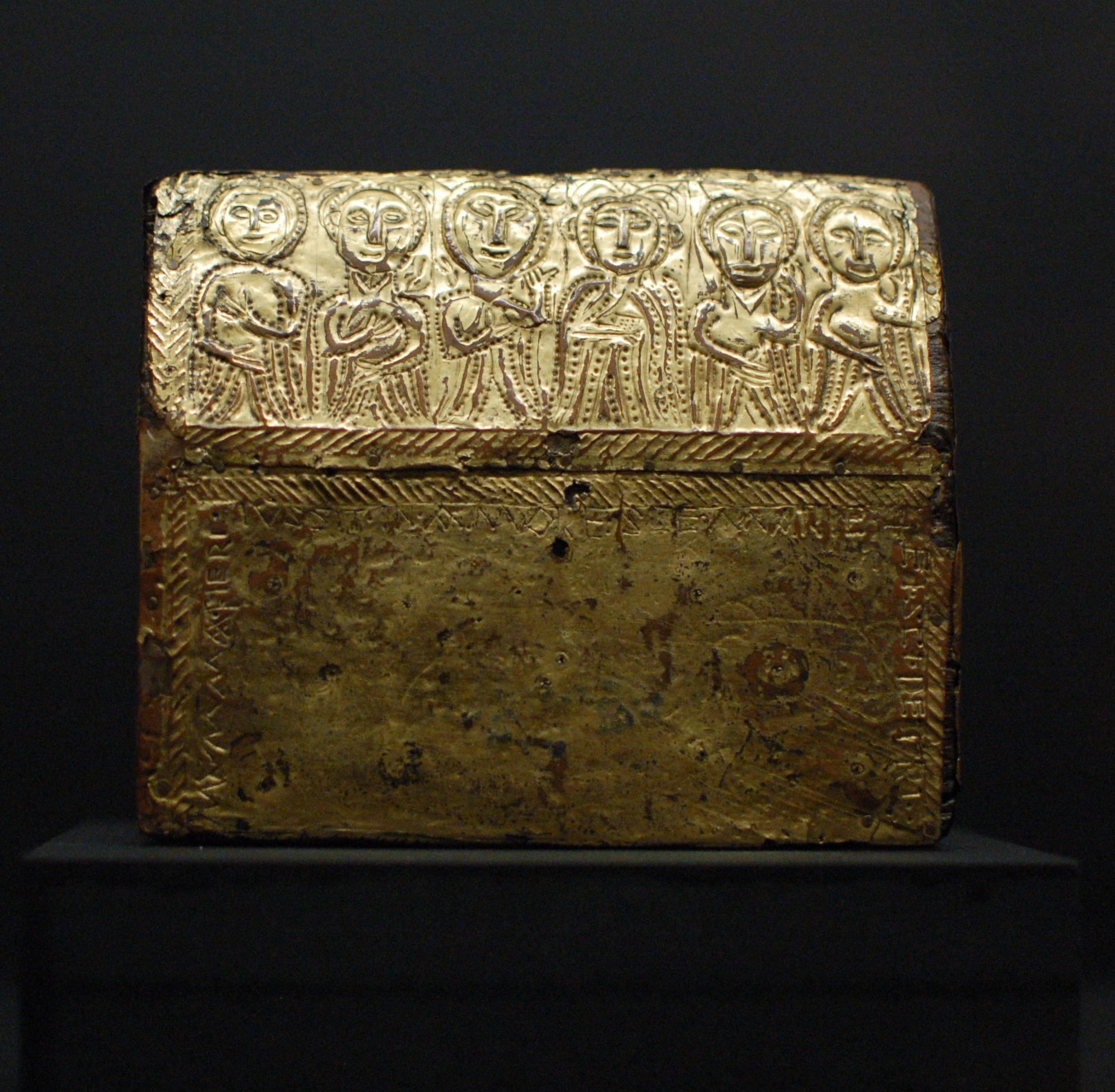 Abbaye de Saint-Benoît-sur-Loire, châsse de Mumma (Mommole)